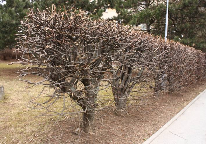 Živý plot lípa